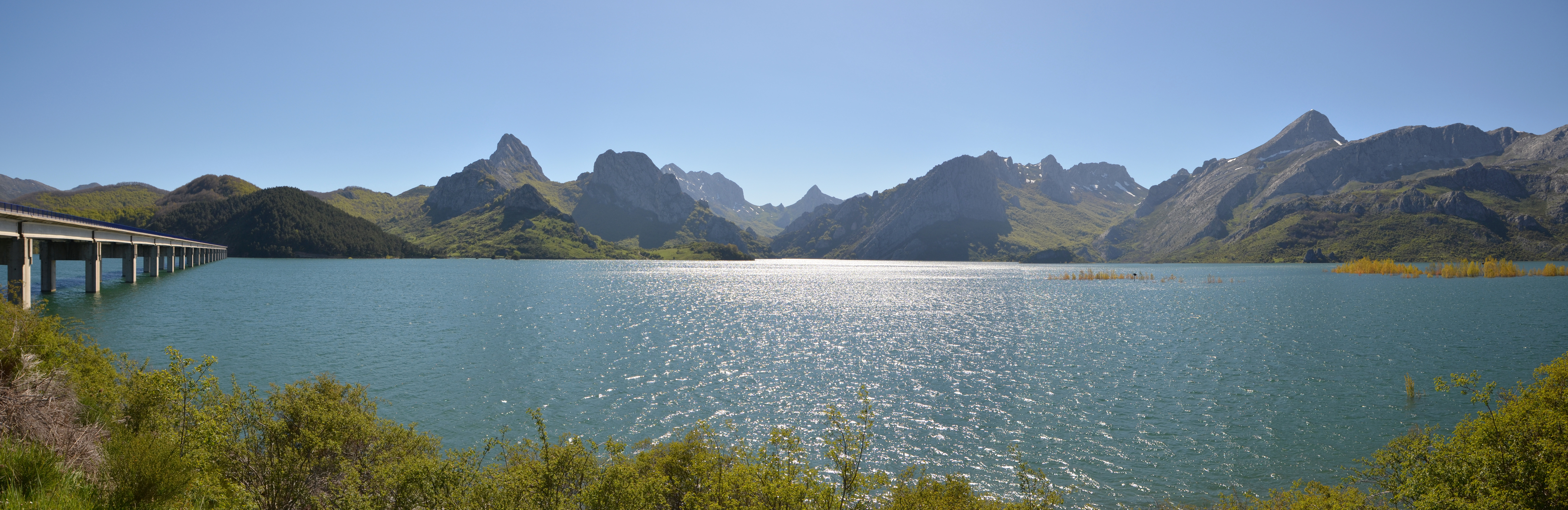 Awesome lake panorama at Riano